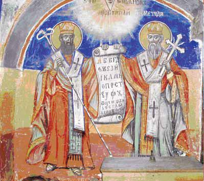 Църквата „Свети Никола“ в Бабино, стенопис на Св. св. Кирил и Методий в олтара, южен зид